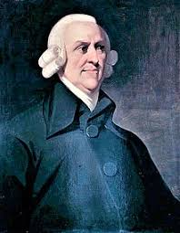 ಕನ್ನಡ: ಆಡ್ಂ ಸ್ಮಿತ್